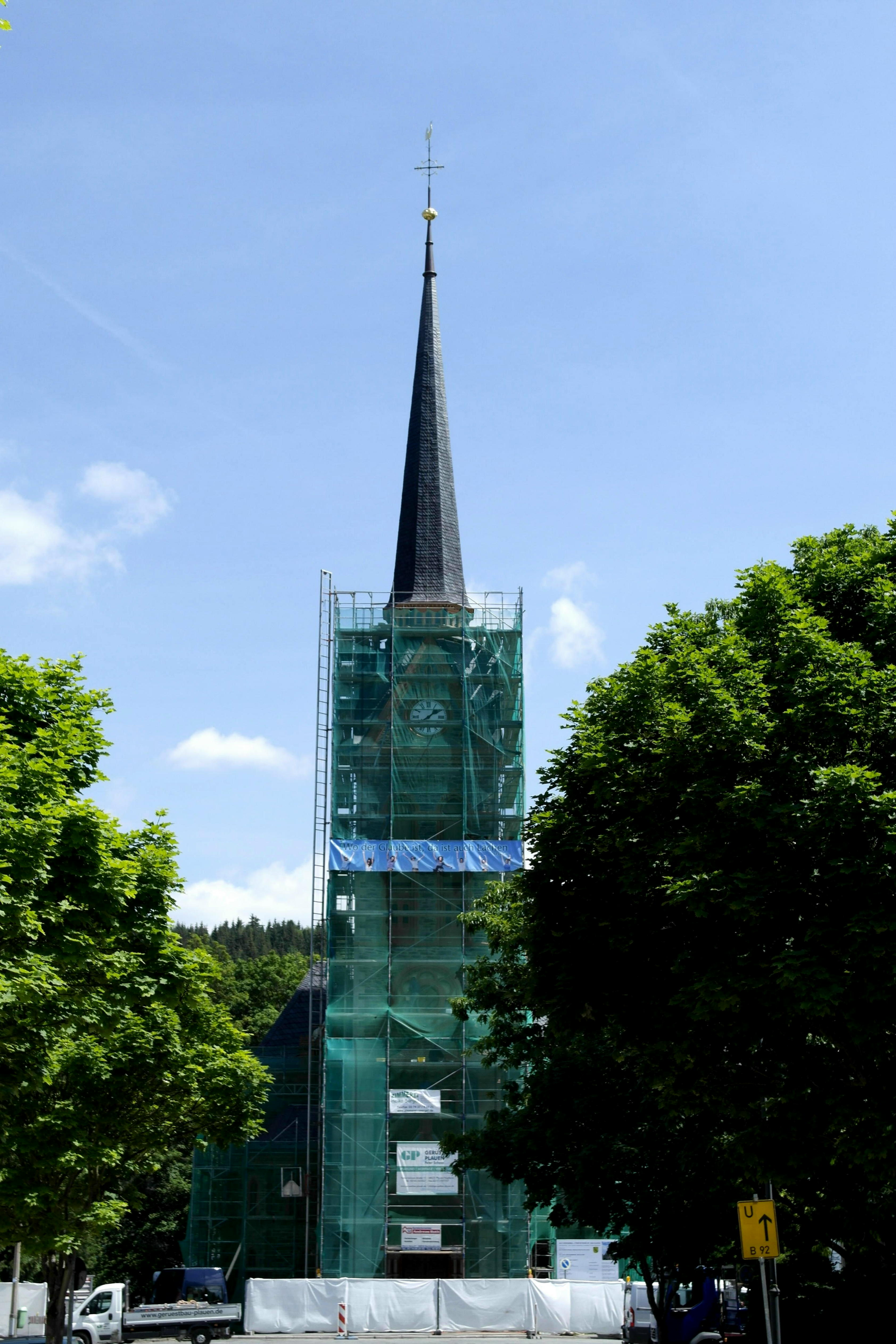 St.Trinitatiskirche in Bad Elster, Turmansicht während der Bauphase